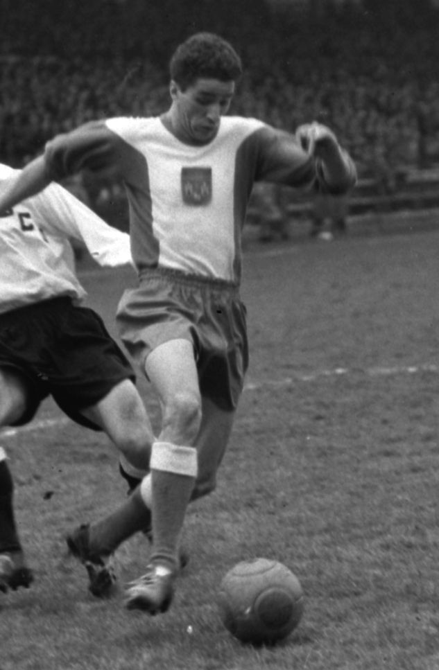 Stadium municipal de Toulouse, 1bis allées Gabriel-Biénès. 27 Janvier 1957. Vue d'un duel entre le toulousain Brahimi et un joueur d'Angers.